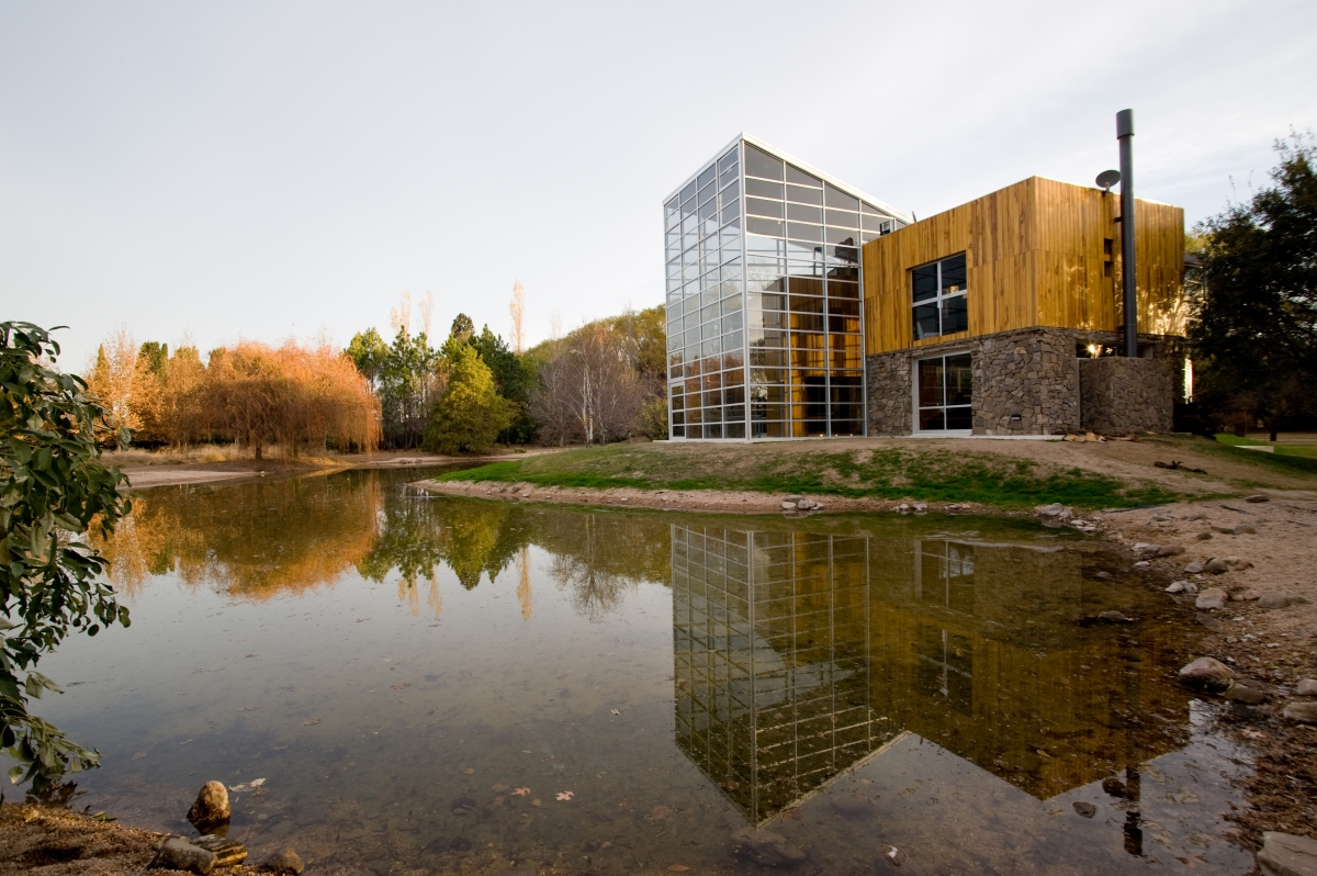 Casa Beamonte. Río Cuarto, Córdoba, Argentina